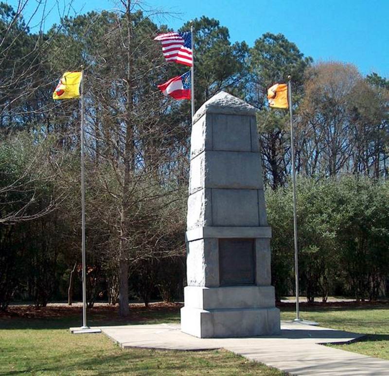 The picture was taken by Cculber007 at New Echota Historic Site The monument on New Echota Historic Site honored the Cherokees who died on the Trail of Tears. (Zdjęcie wykonane w Miejscu Historycznym New Echota, Georgia, USA, ukazuje pomnik poświęcony ofiarom tzw. "Szlaku Łez" - przymusowego wysiedlenia Indian Czirokezów na Terytorium Indiańskie)